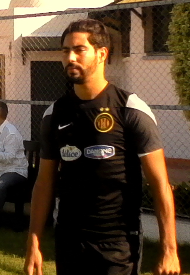 Adem Rjeibi à l'entraînement